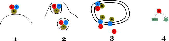 Mode d'action de la toxine diphtérique. R : Domaine récepteur C : Domaine catalytique (toxique) T : Domaine de translocation 1. Fixation du domaine R sur son récepteur membranaire 2. Internalisation du complexe toxine-récepteur et formation d'un endosome 3. Interaction du domaine T avec la membrane de l'endosome, puis, sous l'influence du pH de l'endosome, translocation de la toxine et libération du domaine C dans le cytoplasme 4. Action du domaine C : blocage de la synthèse protéique par ADP-ribosylation du facteur d'élongation (EF-2).